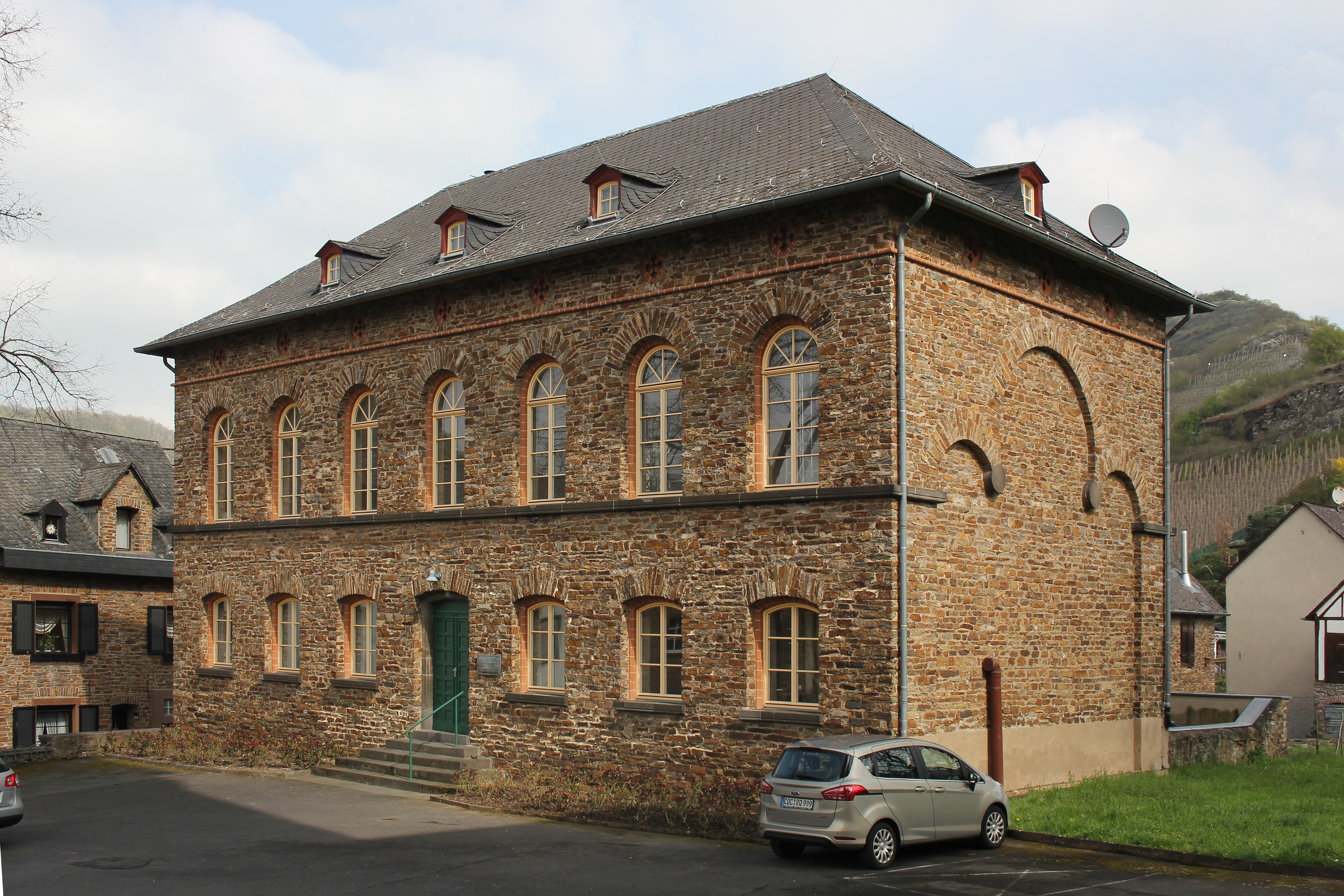 Ehemalige Knabenschule (1831–1976) in Treis, Am Plenzer 1, erbaut nach Plänen von Johann Claudius von Lassaulx um 1830